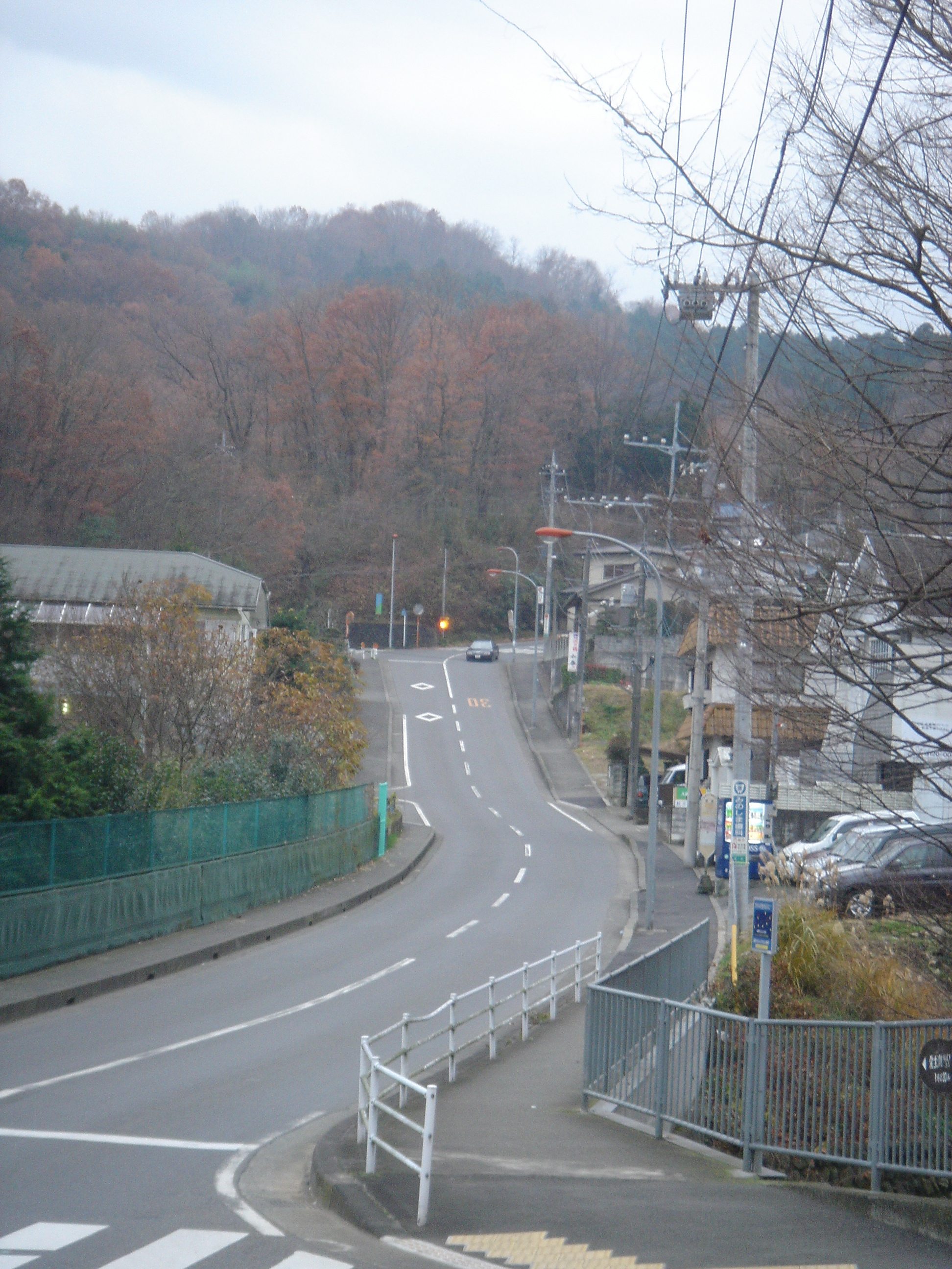 秦野市渋沢